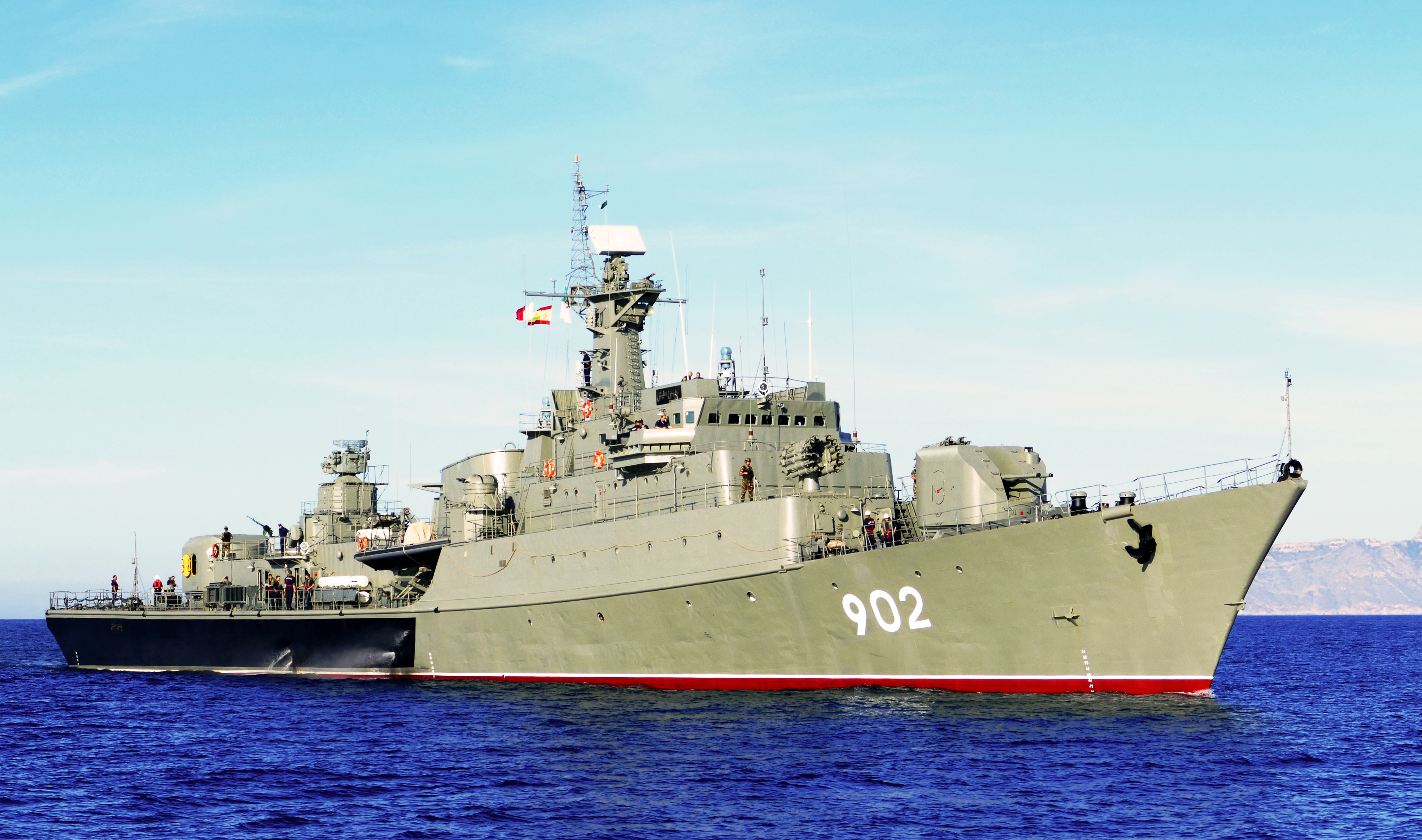 La fregata Algerina di produzione sovietica Rais Kellik presso Cartagena